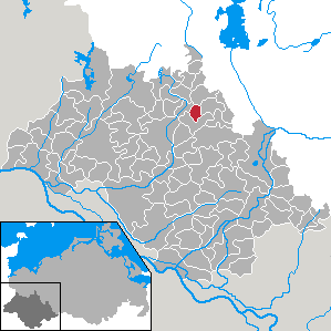 Alt Zachun in Mecklenburg-Vorpommern - district Ludwigslust